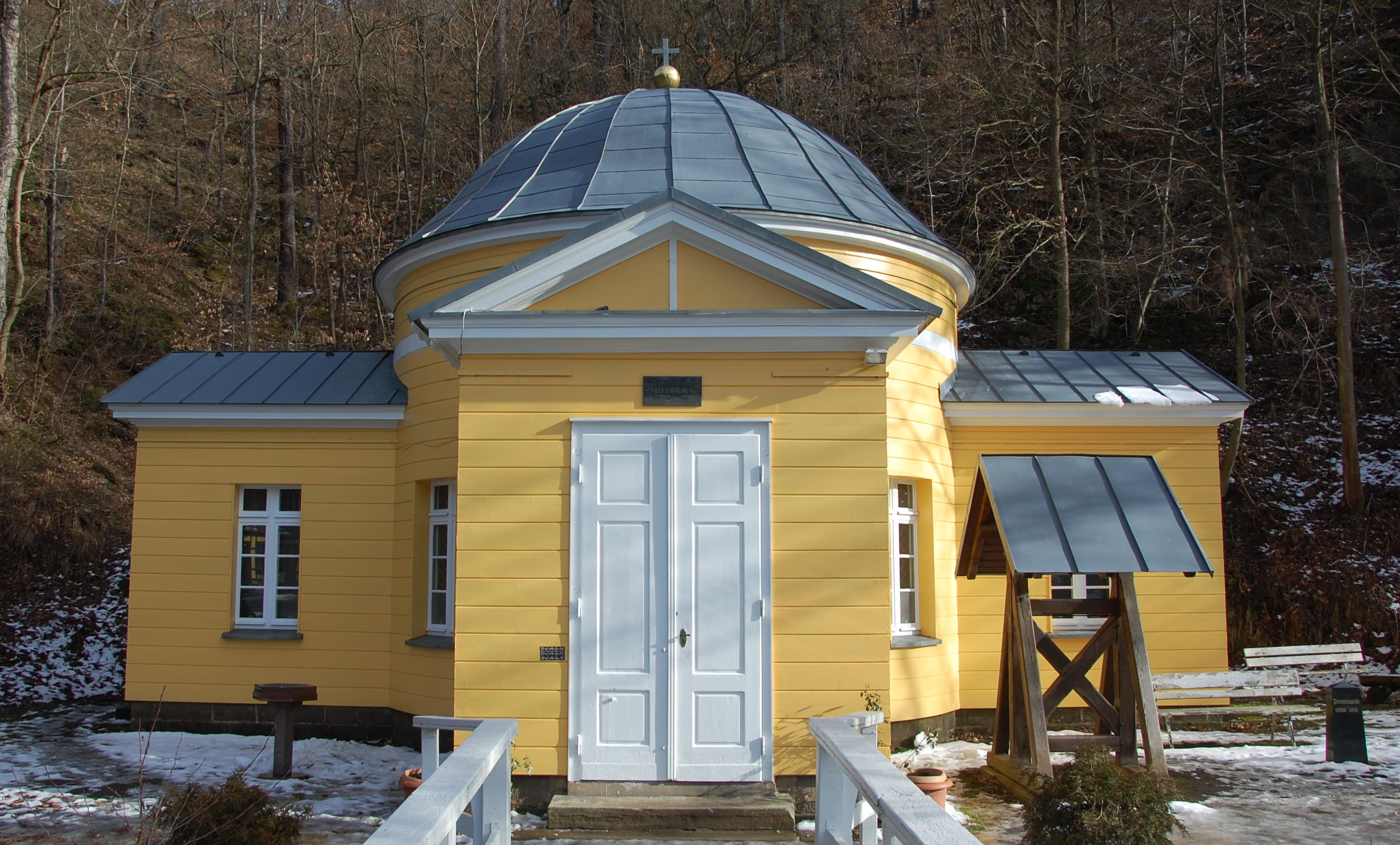 Kirche Alexisbad